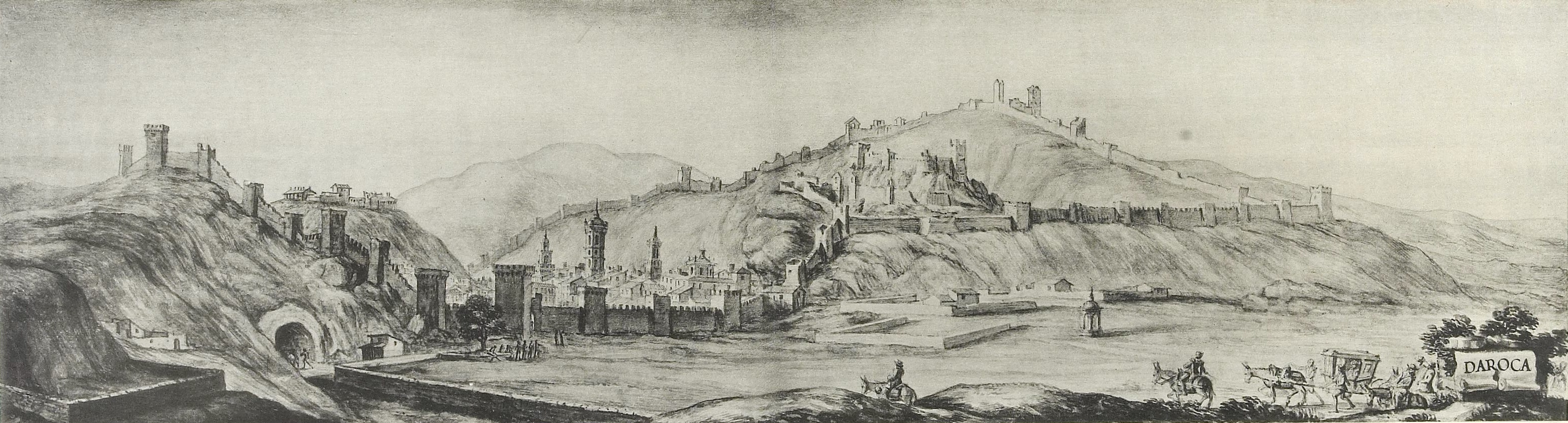 Daroca, acuarela de Pier Maria Baldi, Biblioteca Laurenciana de Florencia, recogida en Sánchez Rivero A, Mariutti de Sánchez Rivero A. "Viaje de Cosme de Médicis por España y Portugal (1668-1669)", Madrid: Sucesores de Rivadeneyra; 1933